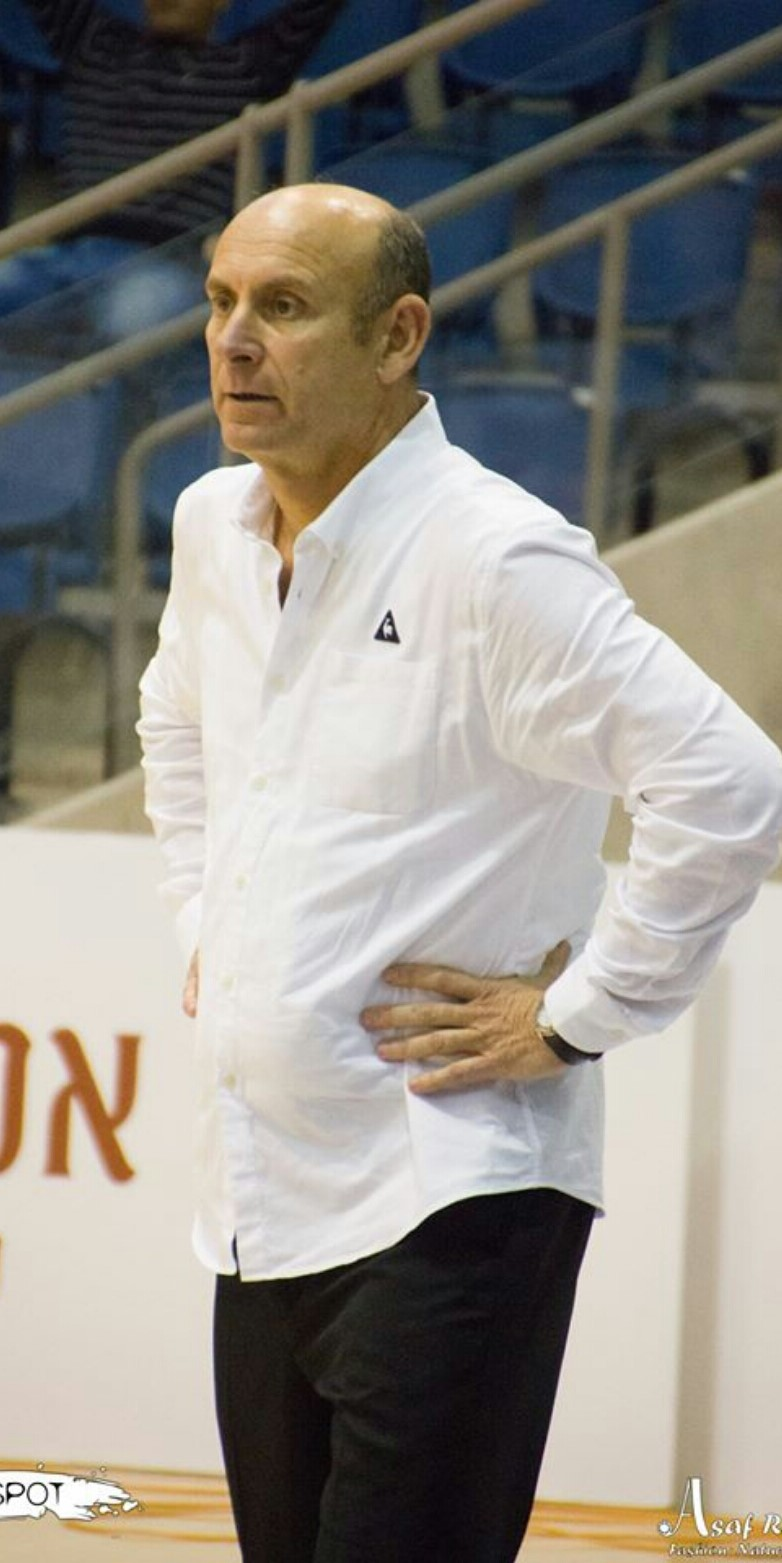 תמונה של ישראל ברוך